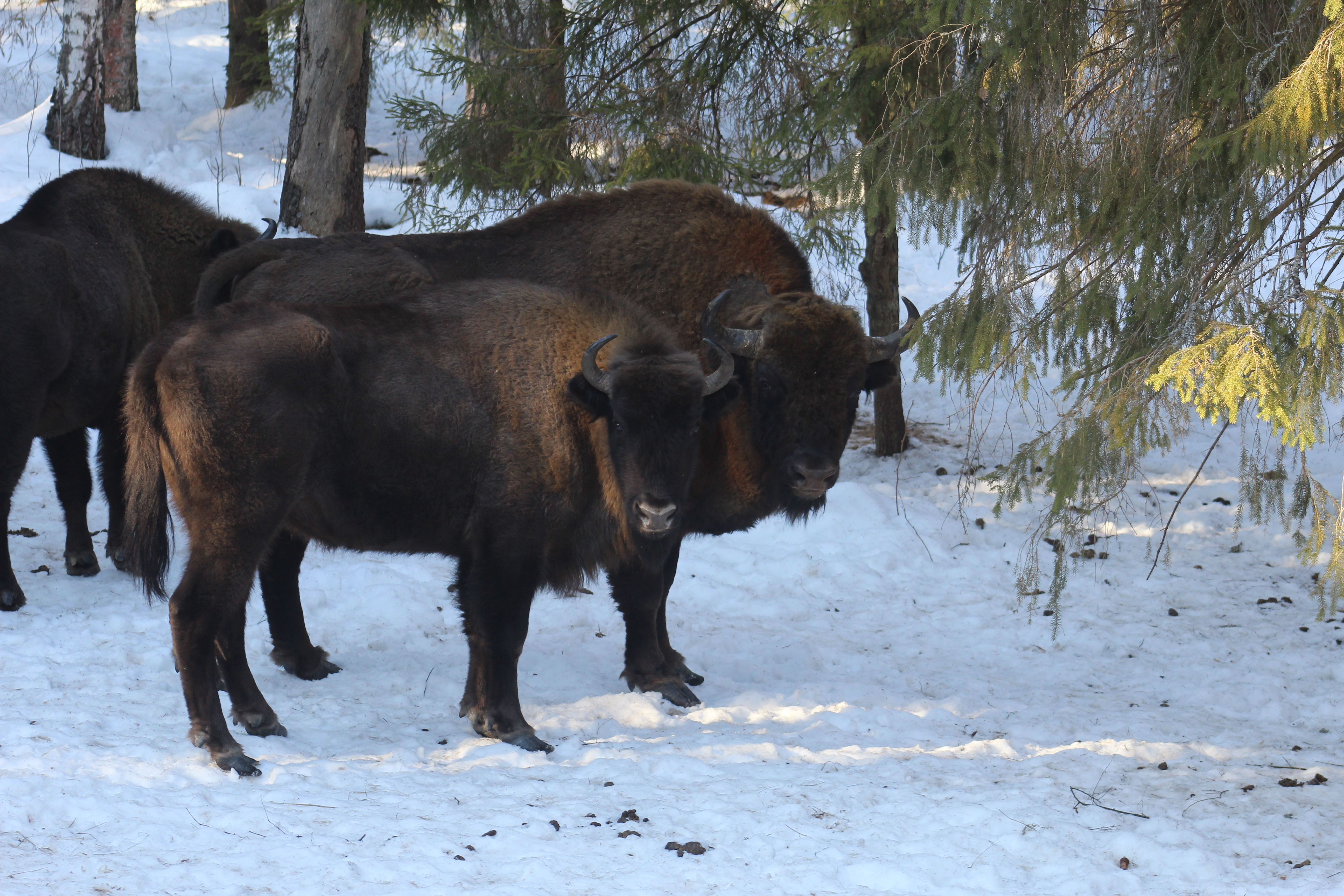 Вольная популяция европейского зубра. Снимок сделан в марте 2015 года